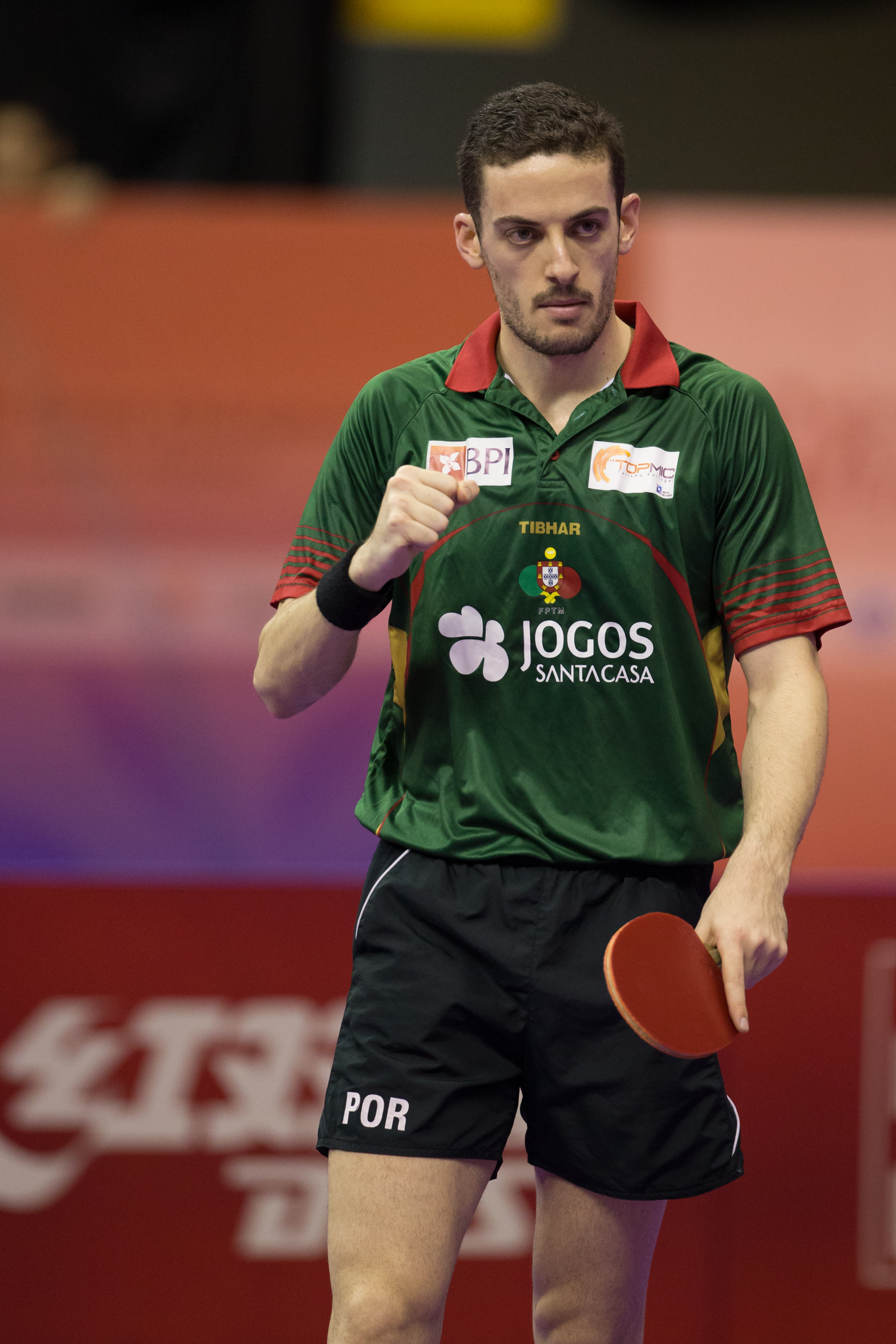 _K0K1445